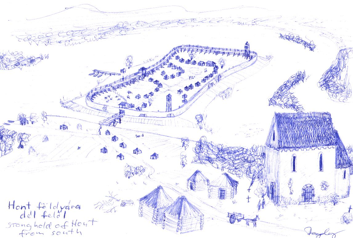 A honti földvár rekonstrukciós rajza déli irányból nézve